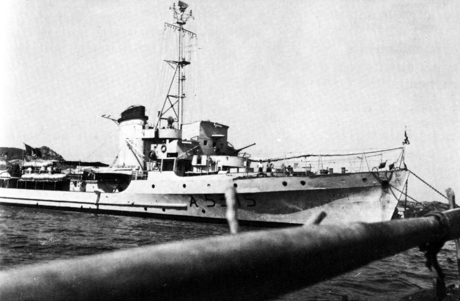 La nave scuola Gazzella a La Maddalena nell’agosto 1961. Foto Aldo Fraccaroli